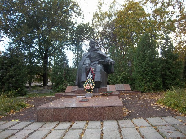 Пам’ятник невідомому солдату